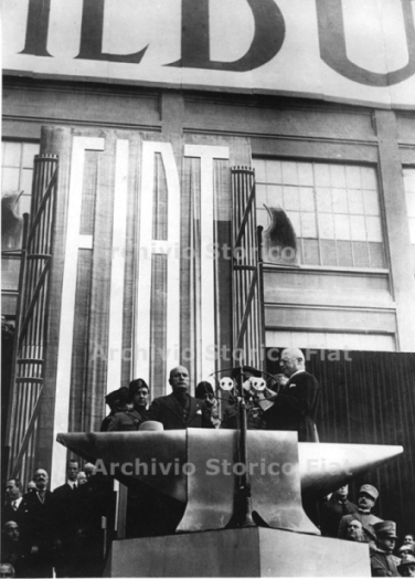 Fotografia a mezzo busto di Benito Mussolini insieme ad altre persone su un podio durante un discorso alle maestranze presso lo stabilimento Fiat Lingotto, Torino (Fiat Group Marketing & Corporate Communication spa, Archivio e centro storico Fiat, Archivio iconografico, Visite, b. V 9)